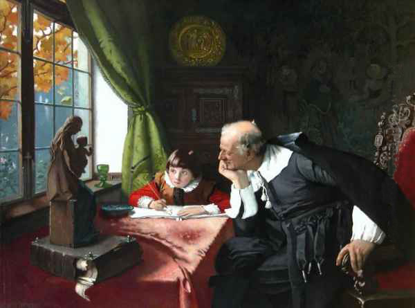 Die Zeichnenstunde